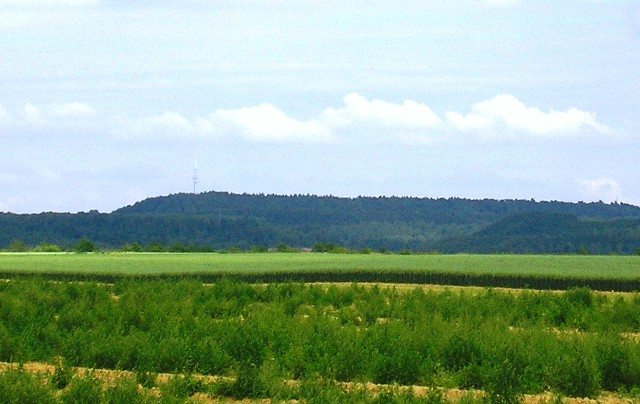 Glessener Höhe (Südseite)